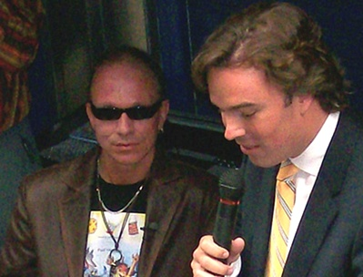 Paul van Loon, Nederlands kinderboekenschrijver (links) met Camiel Eurlings tijdens Wereldverkeersveiligheidsweek 2007